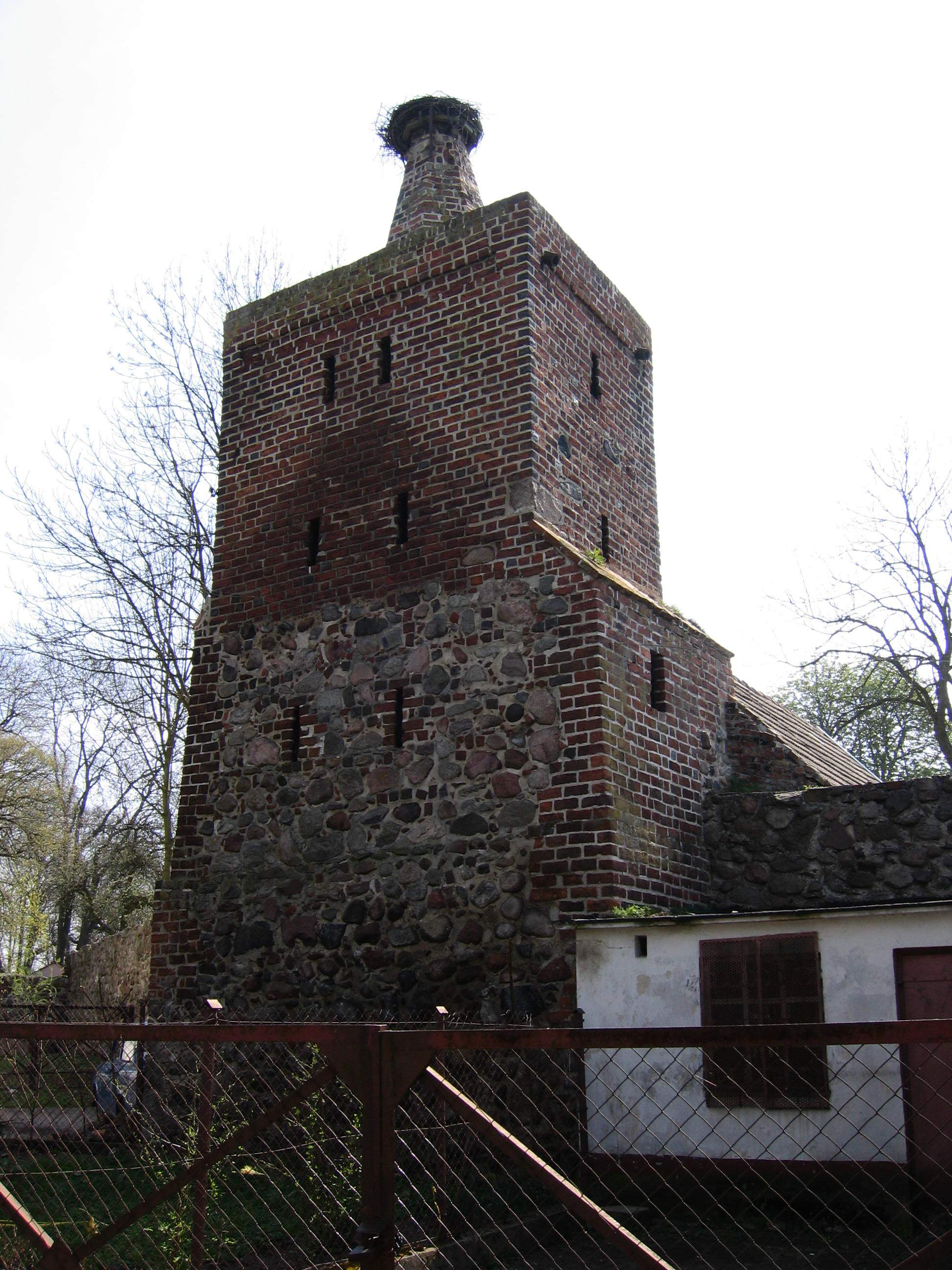 Trzcińsko-Zdrój - Baszta Bociania w zespole obwarowań miejskich